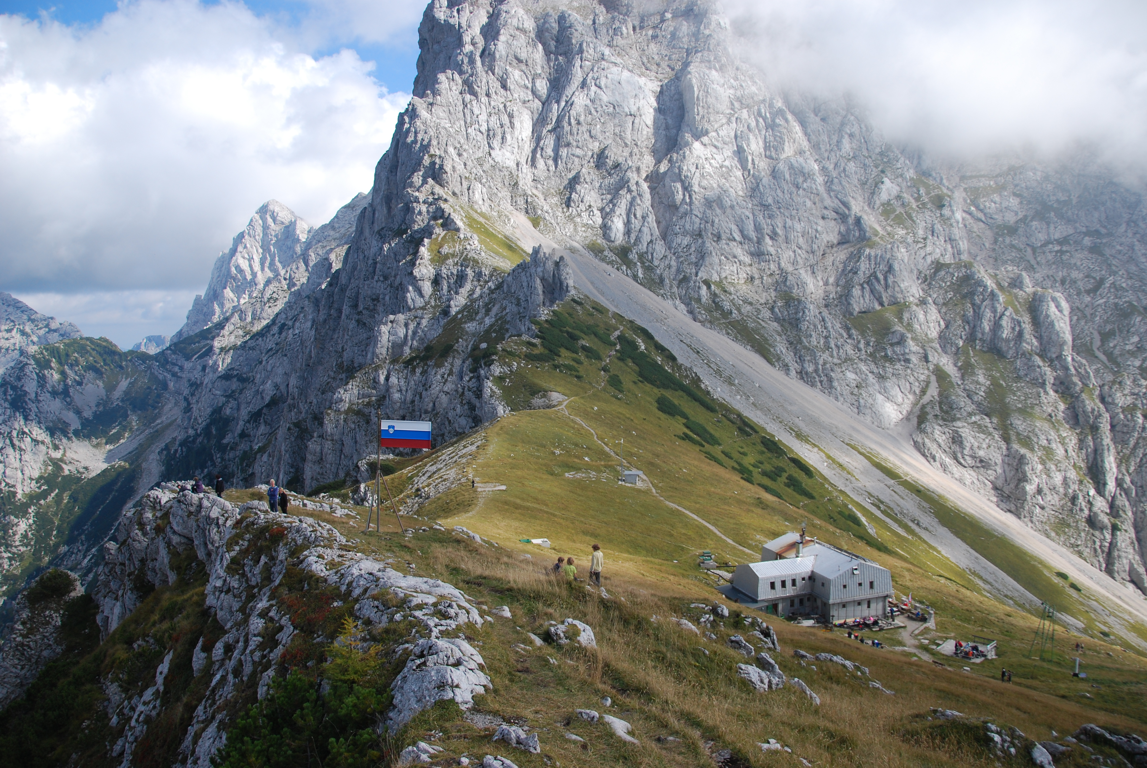 Pogled na 1864 m visoko Kamniško sedlo s Kamniško kočo.